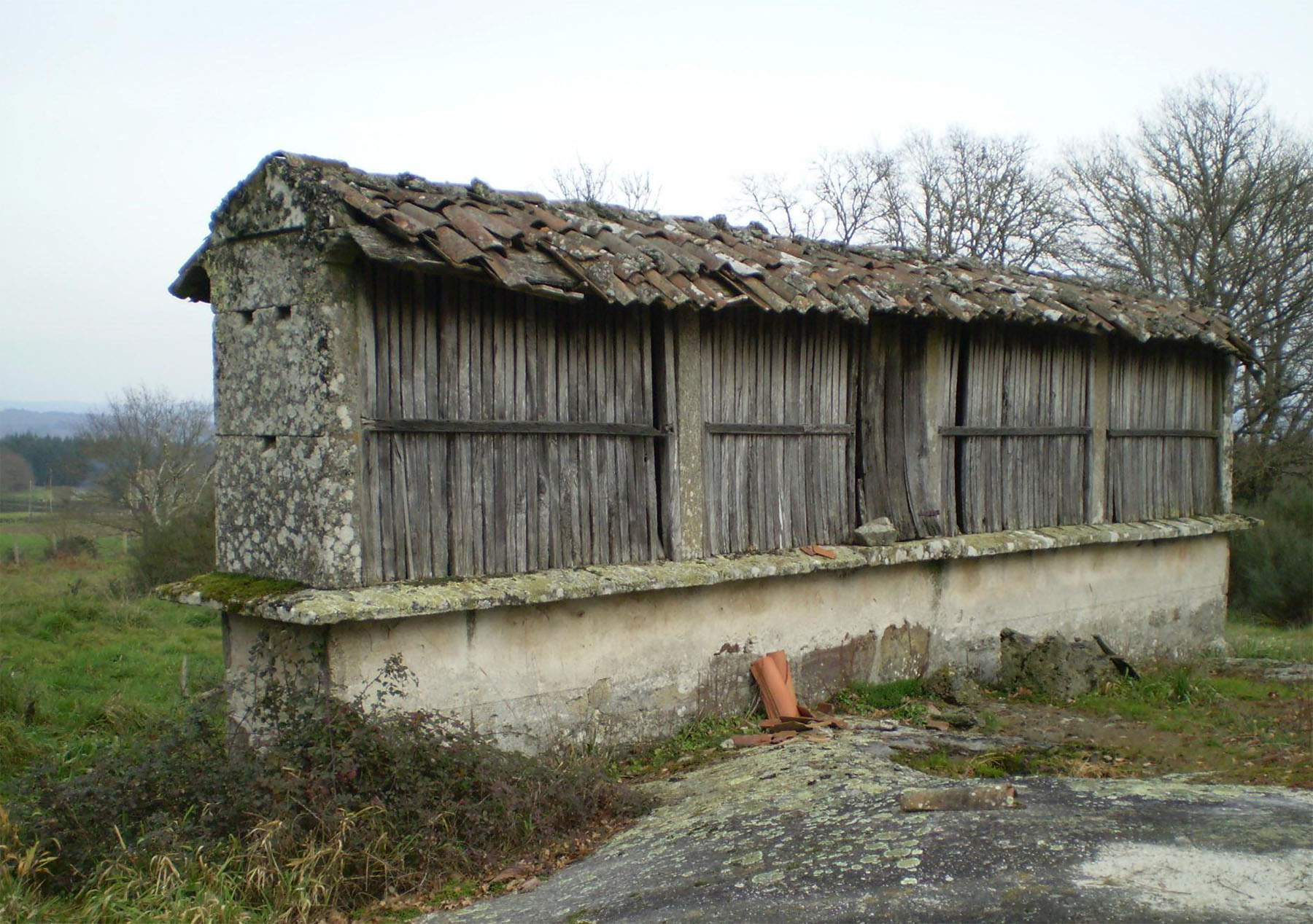 Hórreo de tipo mahía, de catro claros, sobre soleira de mamposteiría caleada. Cuberto de tella do país e sen adornos. Este hórreo presenta unhas dimensións excepcionalmente máis grandes do habitual na zona, tanto na anchura da cámara como na lonxitude de cada un dos claros. Ubícase en Vilapoupre (Antas de Ulla)